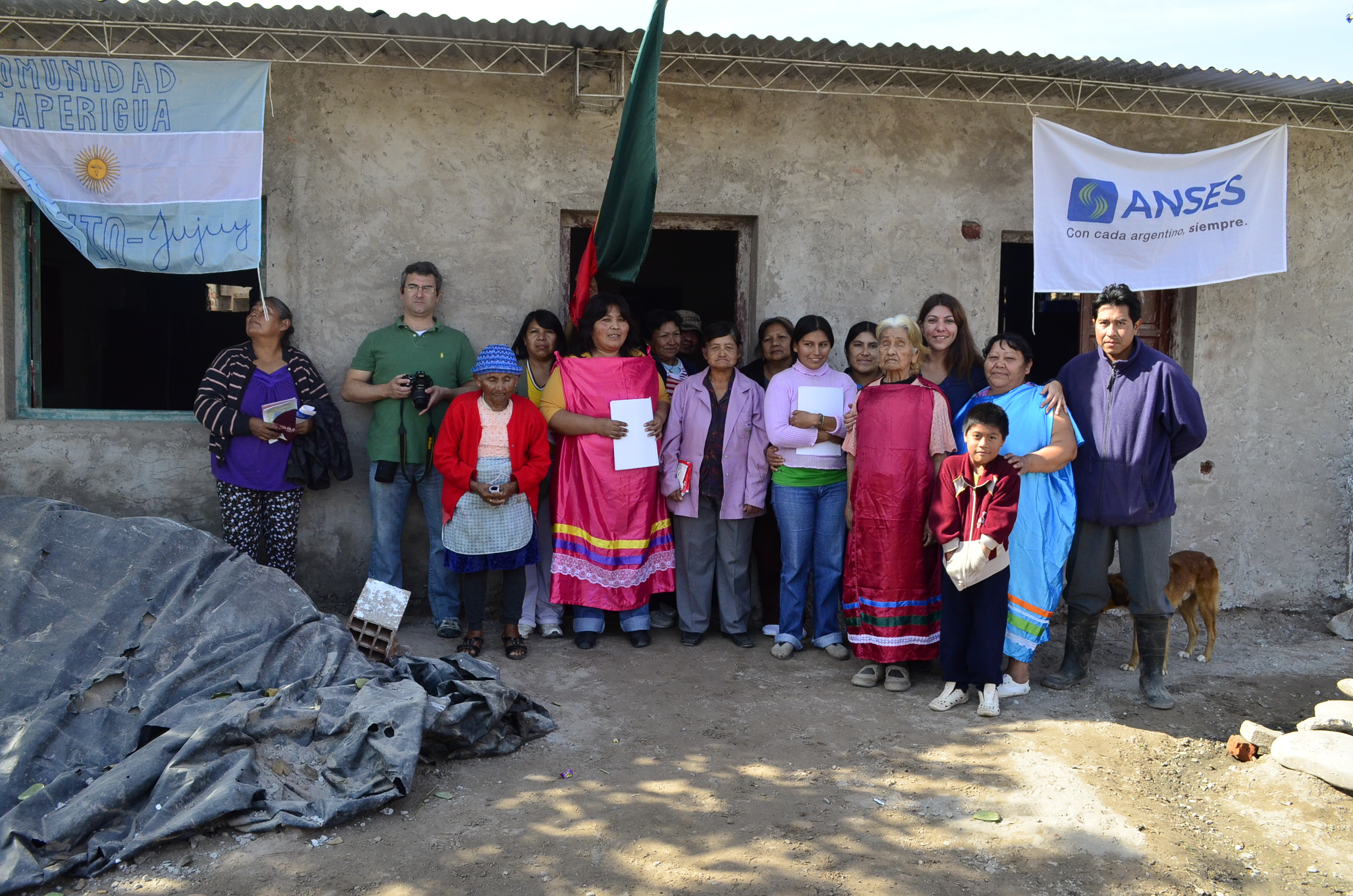 Las acciones que lleva adelante ANSES orientadas a los pueblos originarios aseguran la presencia de la seguridad social, con criterios de pluralidad, inclusión y participación de las comunidades donde el organismo acciona. Actualmente, el organismo previsional desarrolla diferentes programas que abordan la cuestión indígena de una manera integral: capacitación presencial, campaña informativa en lenguas originarias y entrega de netbooks en escuelas de Educación Intercultural Bilingüe. Desde 2009, implementa el programa Bienestar para nuestra gente de capacitación en Seguridad Social para los pueblos indígenas. El programa tiene como propósito garantizar el acceso de los pueblos indígenas a las prestaciones de la Seguridad Social, desde el respeto y valorización de su identidad cultural. La iniciativa contempla el mejoramiento de los canales institucionales para la tramitación de las prestaciones de ANSES y formación y capacitación sobre los derechos. Para complementar las jornadas de formación y ampliar el impacto, durante 2011 trabajó en una campaña informativa en diversas lenguas indígenas para realizar afiches y micros radiales sobre la Asignación Universal y por Embarazo, la posibilidad de obtener una jubilación y los derechos sociales que otorga ANSES. La campaña informativa en lenguas indígenas se realizó de manera participativa, por eso ANSES realizó jornadas junto a qom y wichis de Ing. Juarez en Formosa y con mbya guaraní de Aristóbulo del Valle, Misiones. Todas las comunidades recibieron con entusiasmo la propuesta y emprendieron el trabajo de realizar las traducciones en conjunto. En cada una de los encuentros se debatía acerca del significado para la comunidad de las prestaciones que brinda ANSES y los maestros bilingües fueron los encargados de las traducciones tanto para el guión del spot radial como para el texto de la pieza gráfica.